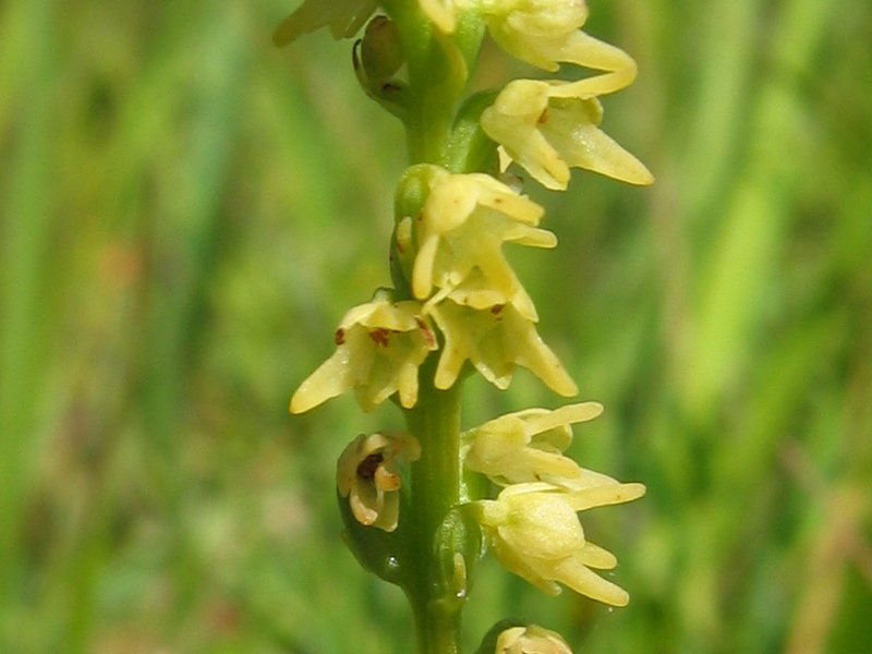 Einknollige Honigorchis Herminium monorchis, Müritz-Gebiet